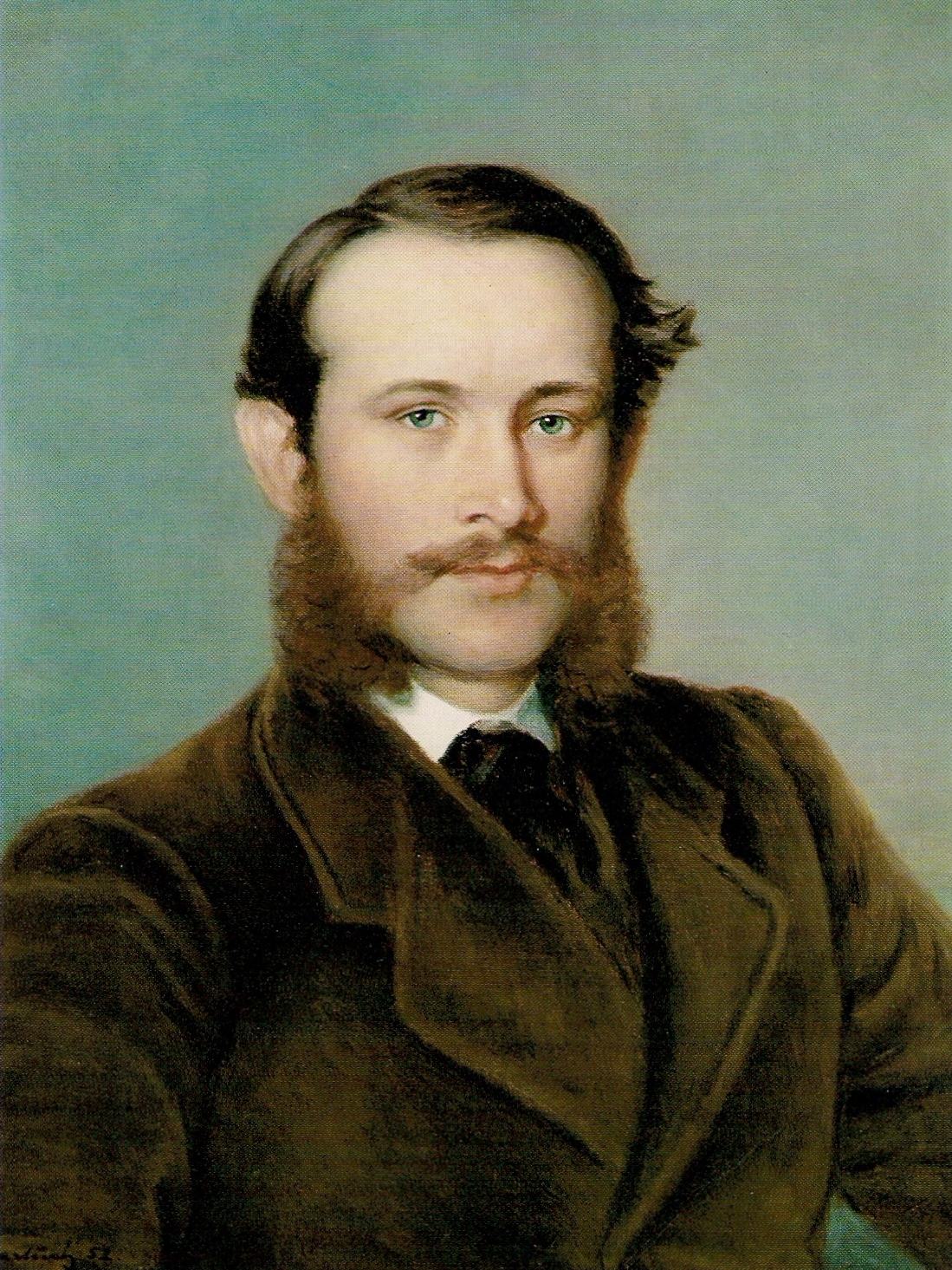 Valentin Pfeifer, Unternehmer Datum: um 1865 Urheber: unbekannt Quelle: Adresse des Bildes